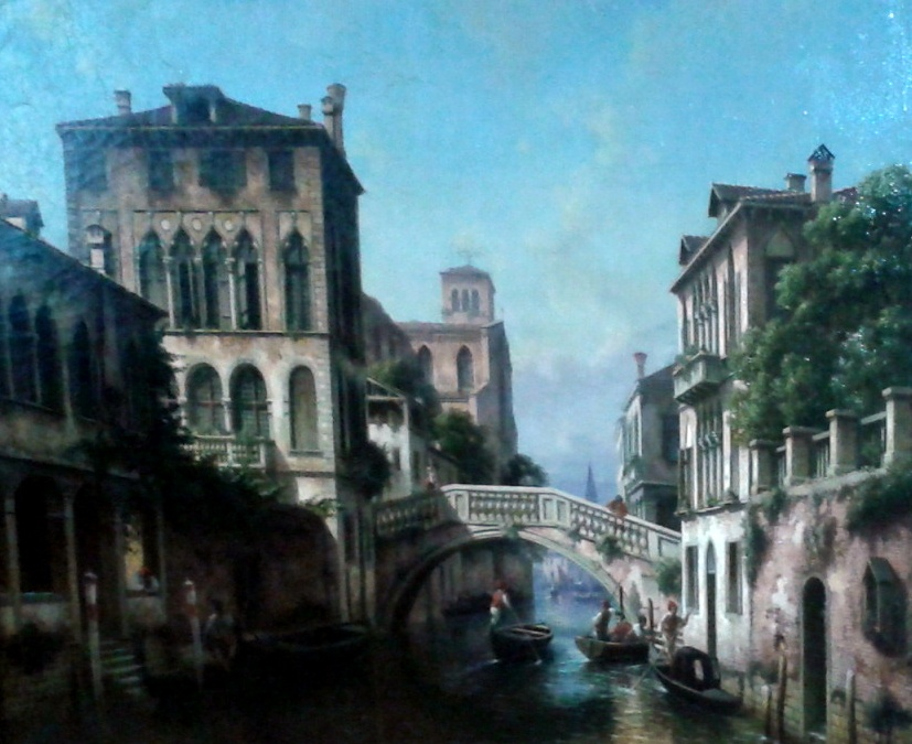 Julius Helfft - Kanał w Wenecji. Muzeum Narodowe w Poznaniu